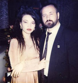 Беларуская (тарашкевіца): Наталi Арт i яе прадусер Валер Буяк